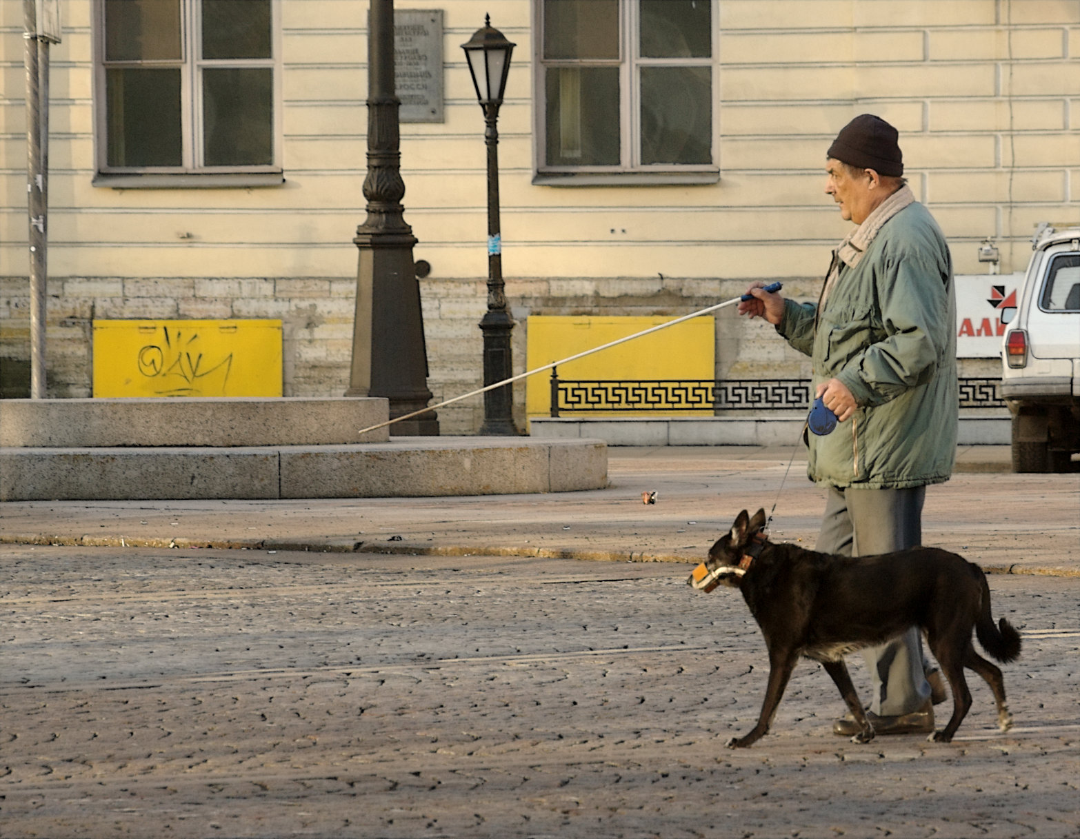 Слепой с собакой-поводырём